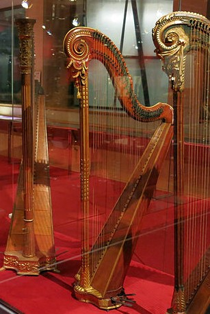 Detalh muishant sonque l'arpa deus Cousineau